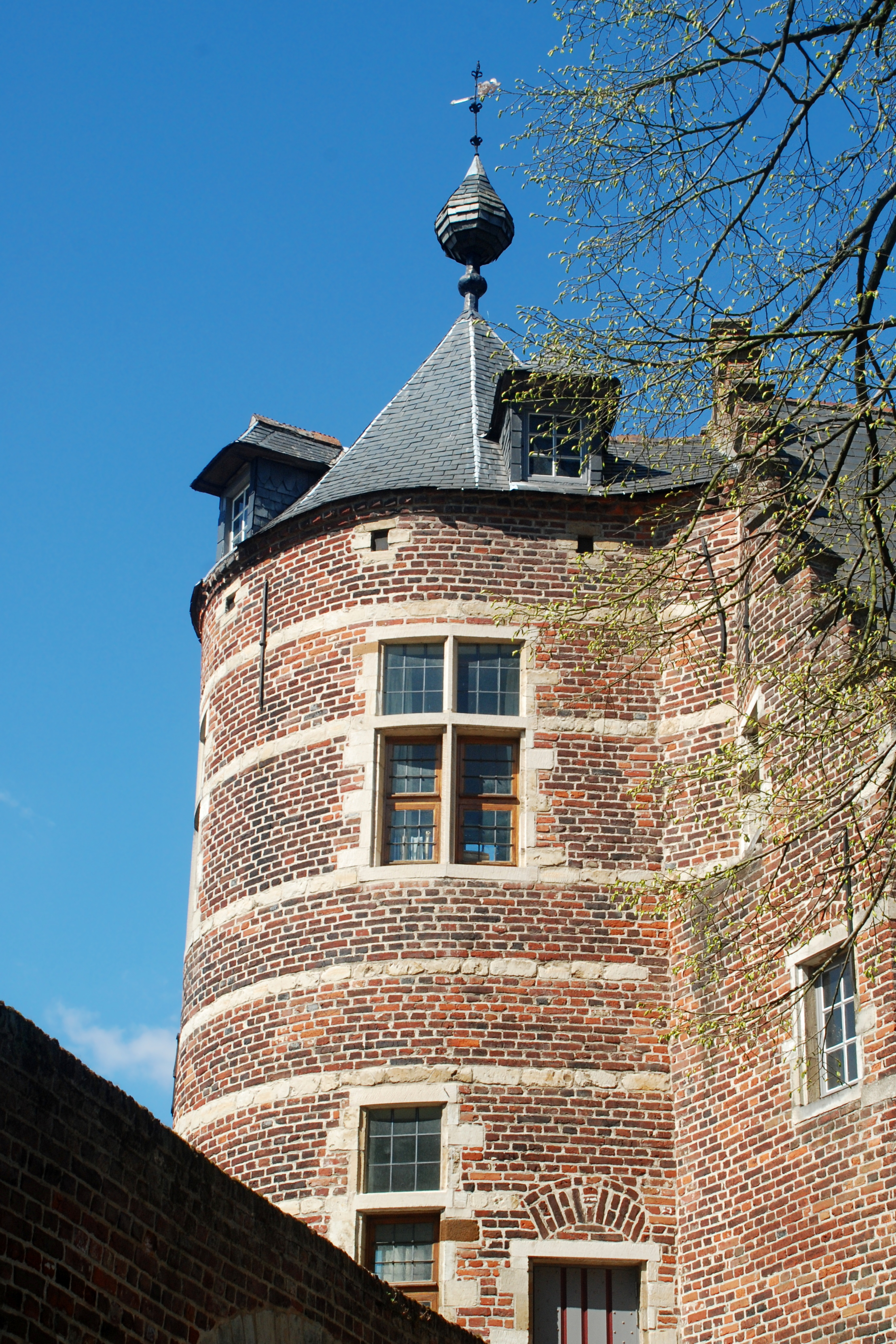 Belgique - Brabant flamand - Louvain - Première enceinte de Louvain - Waterpoort (derrière le Hollandcollege ou Paridaensinstituut)